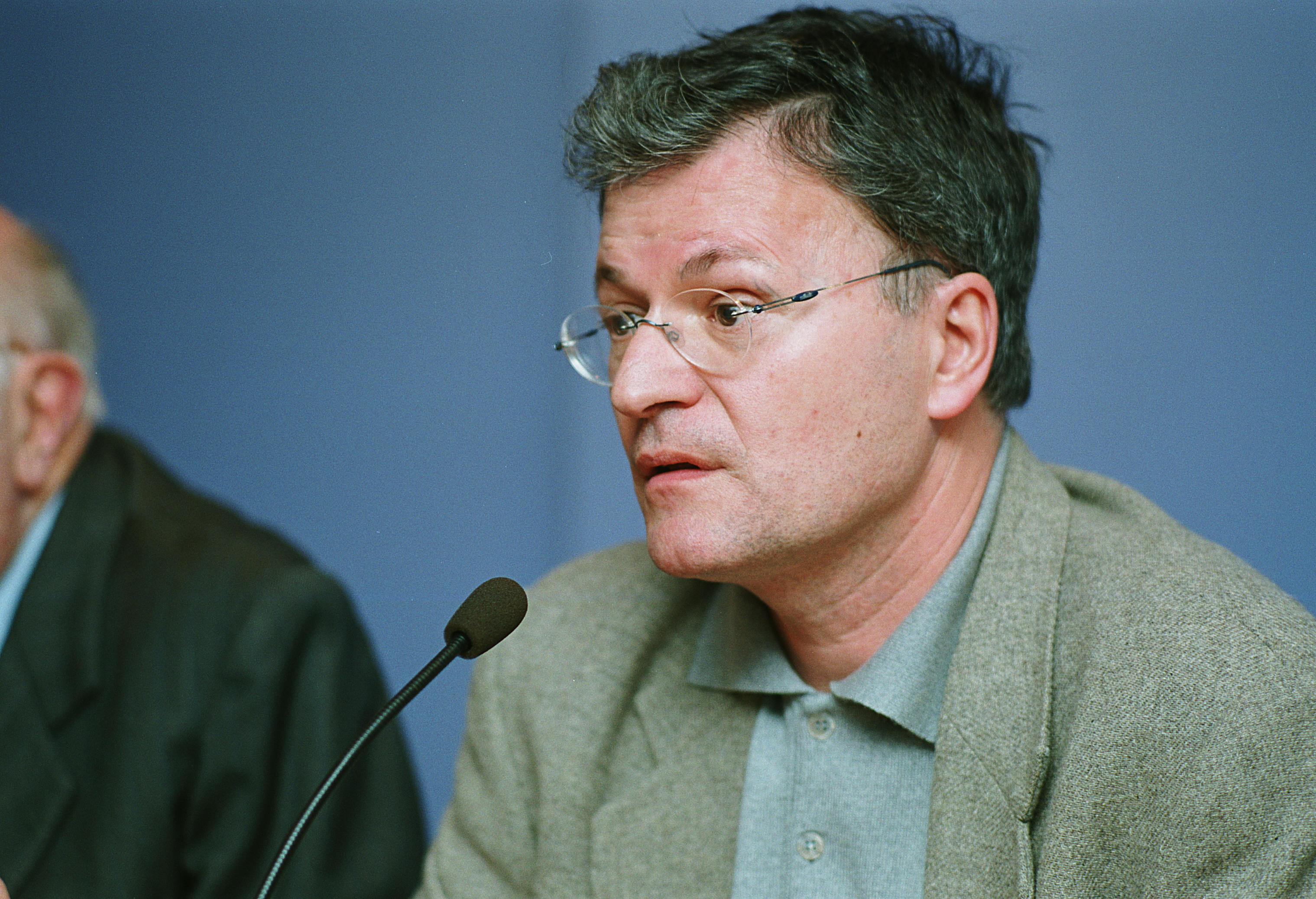 Solé i Sabaté al MHC el 2001.